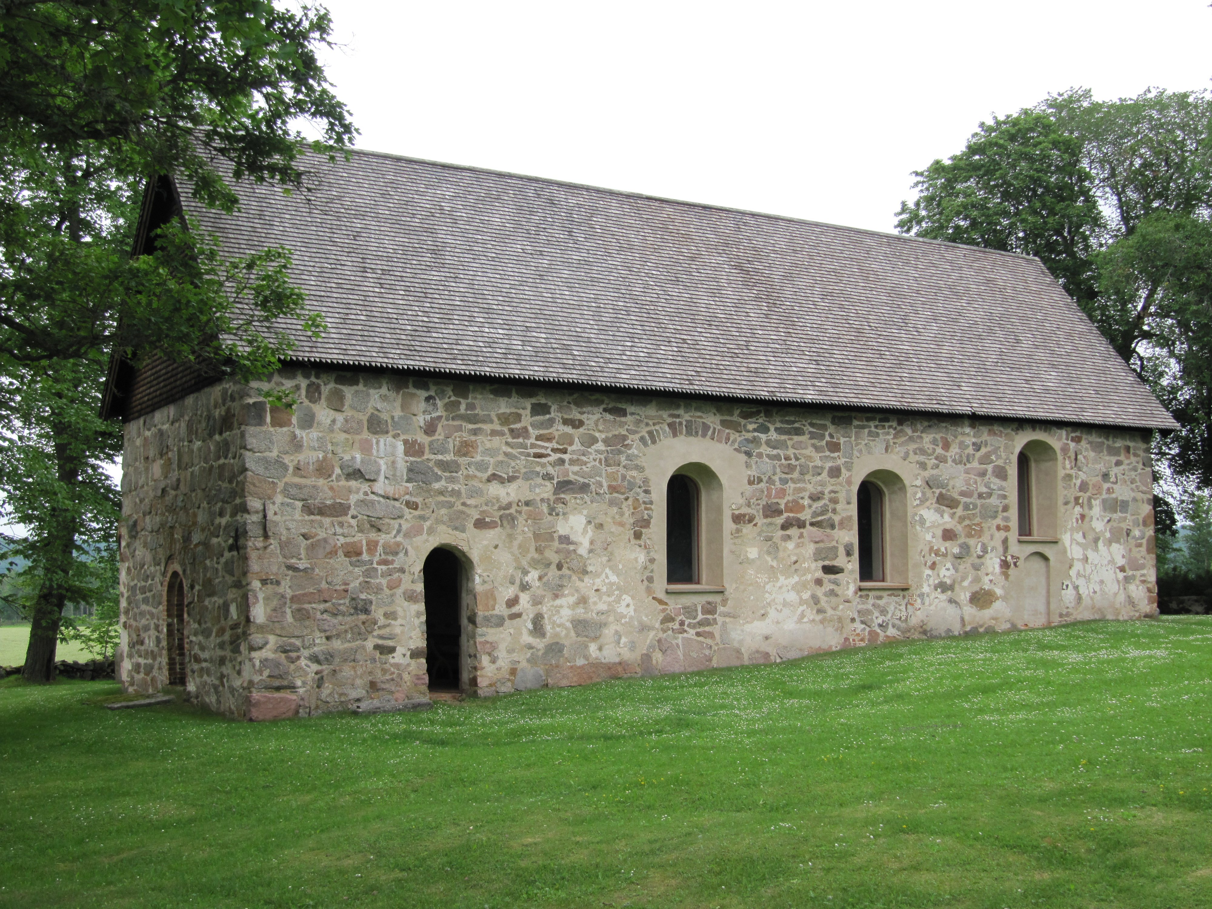 Hägerstads gamla kyrka